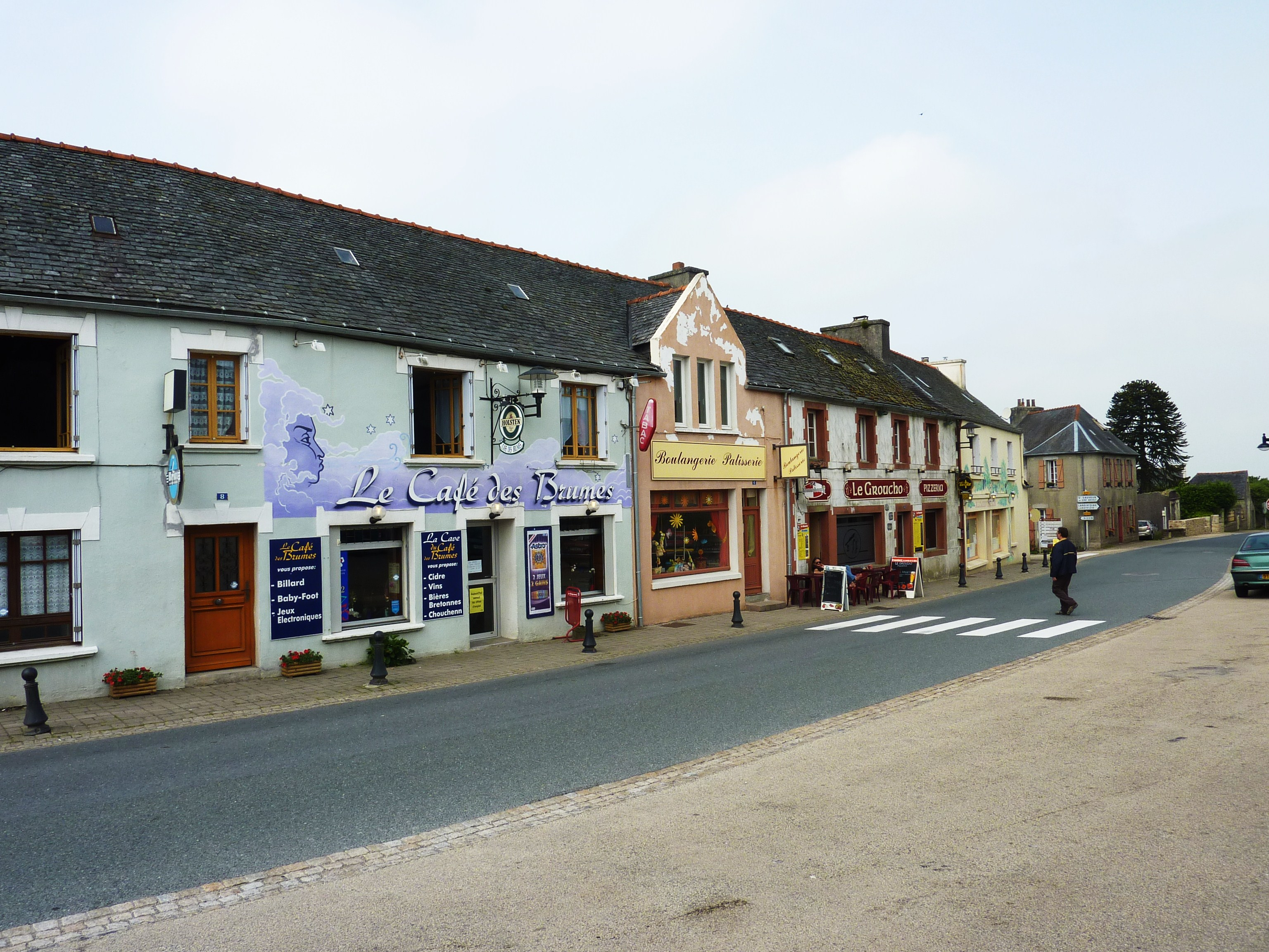 Commana Les commerces de la place devant l'église